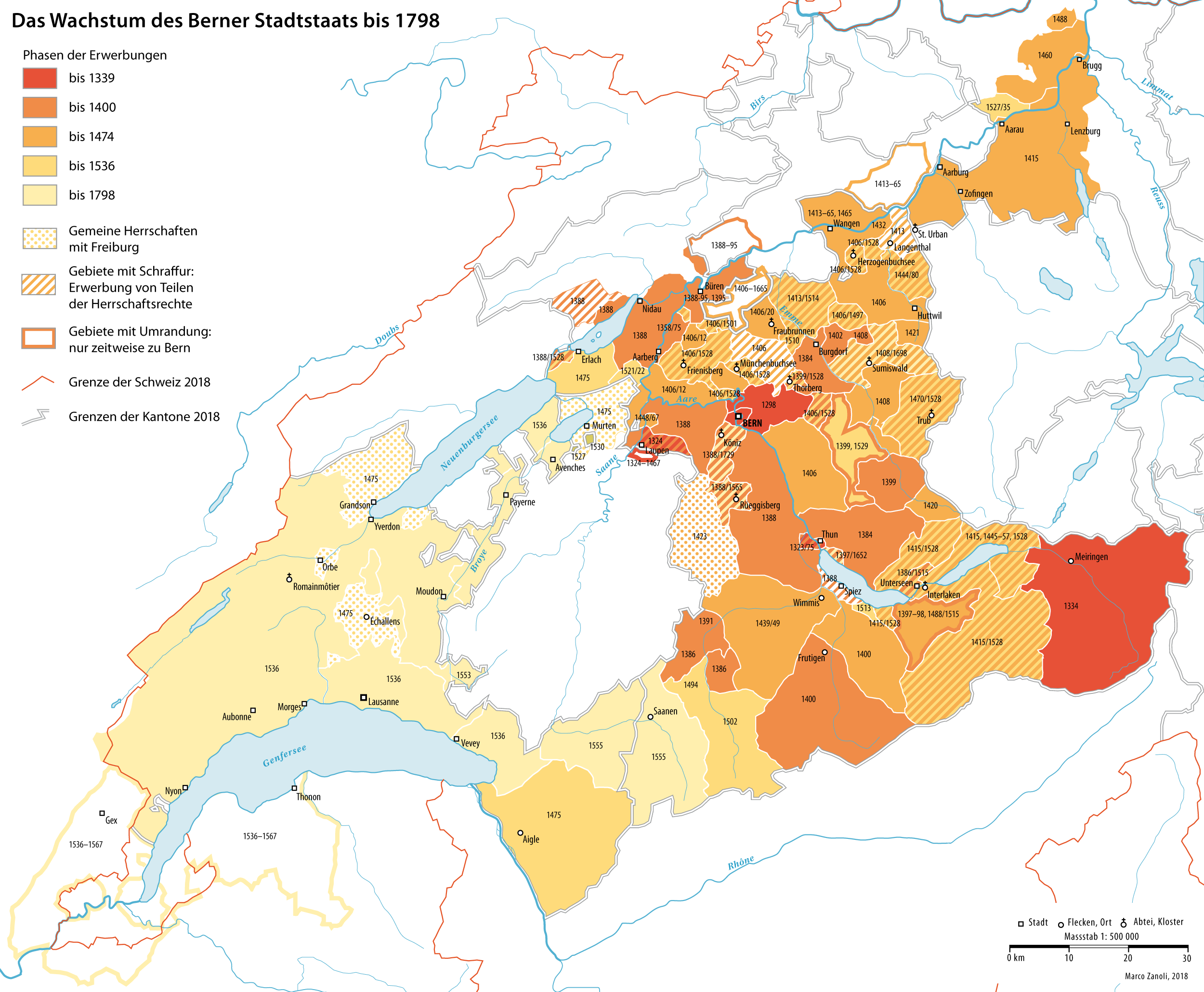 Karte des Wachstums des Gebiets des Stadtstaats Bern bis 1798